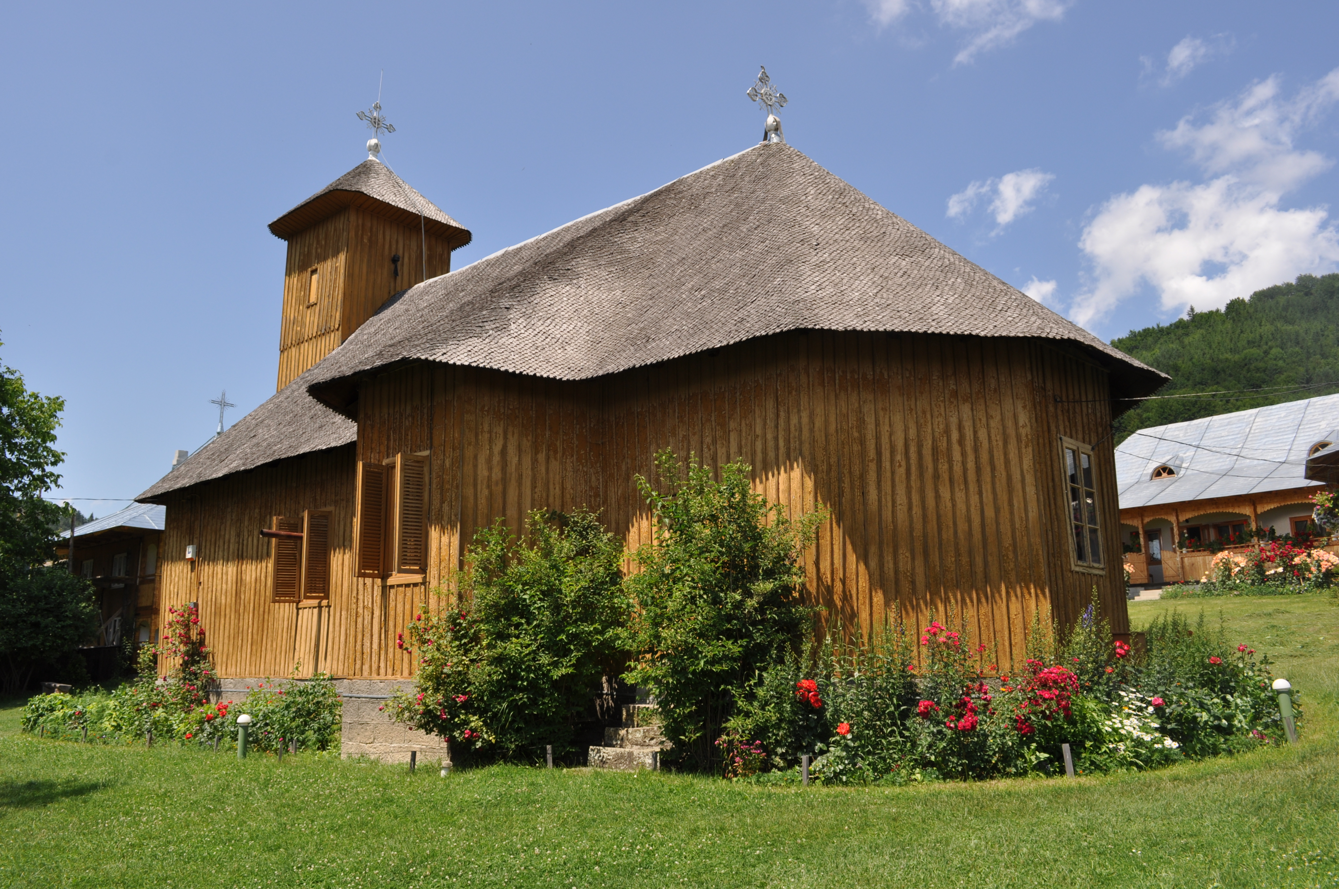 Mănăstirea Lepșa, Vrancea